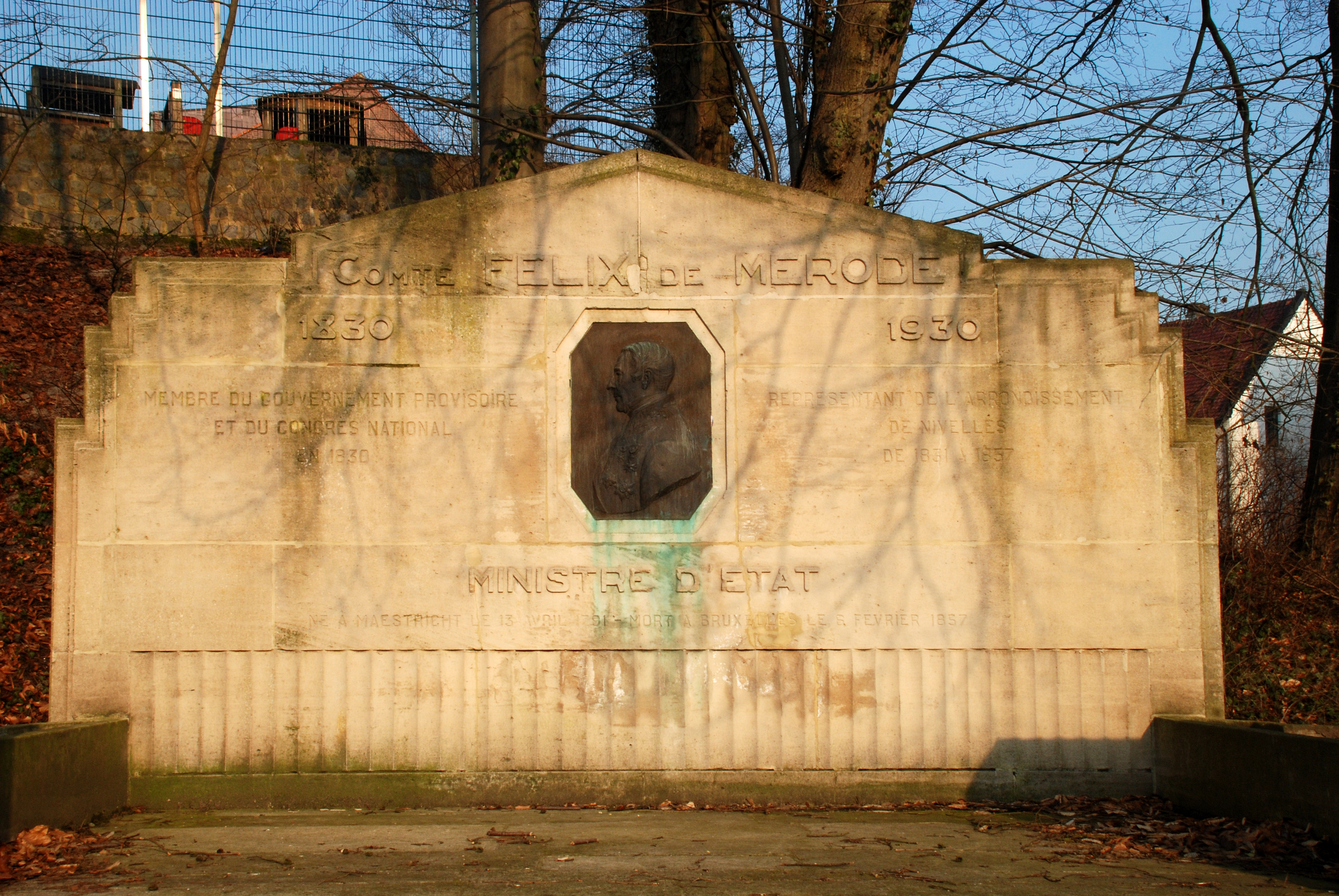 Belgique - Brabant wallon - Rixensart - Monument au comte Félix de Mérode